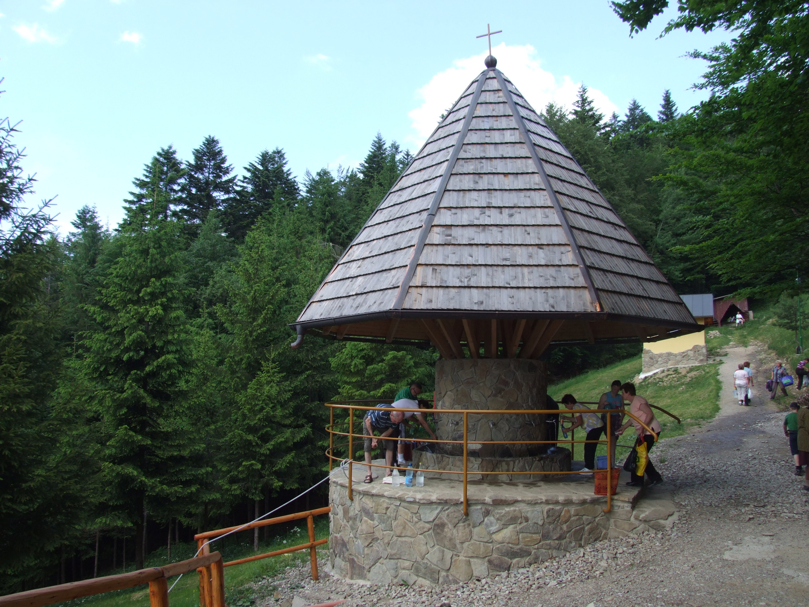 Litmanová. Żródełko z cudowną wodą.